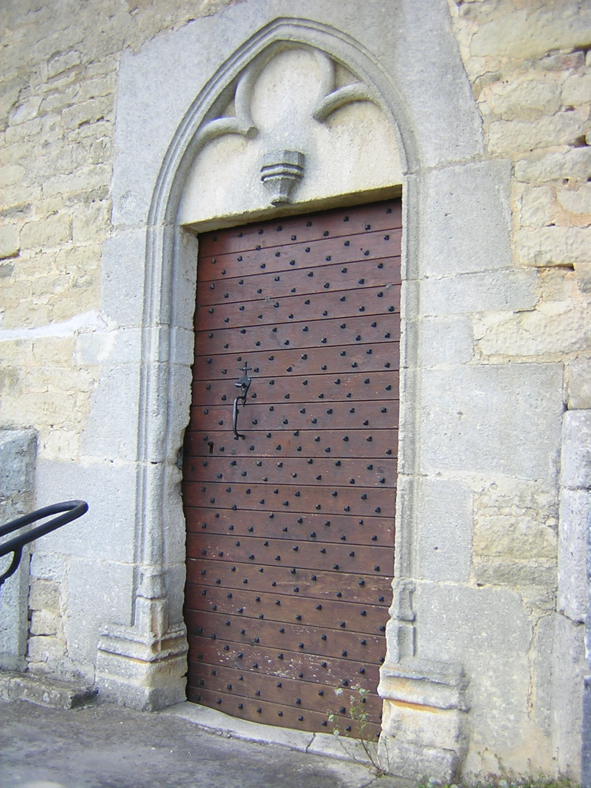 porte médiévale de l'église de Bricon